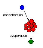 Fait à la "main"